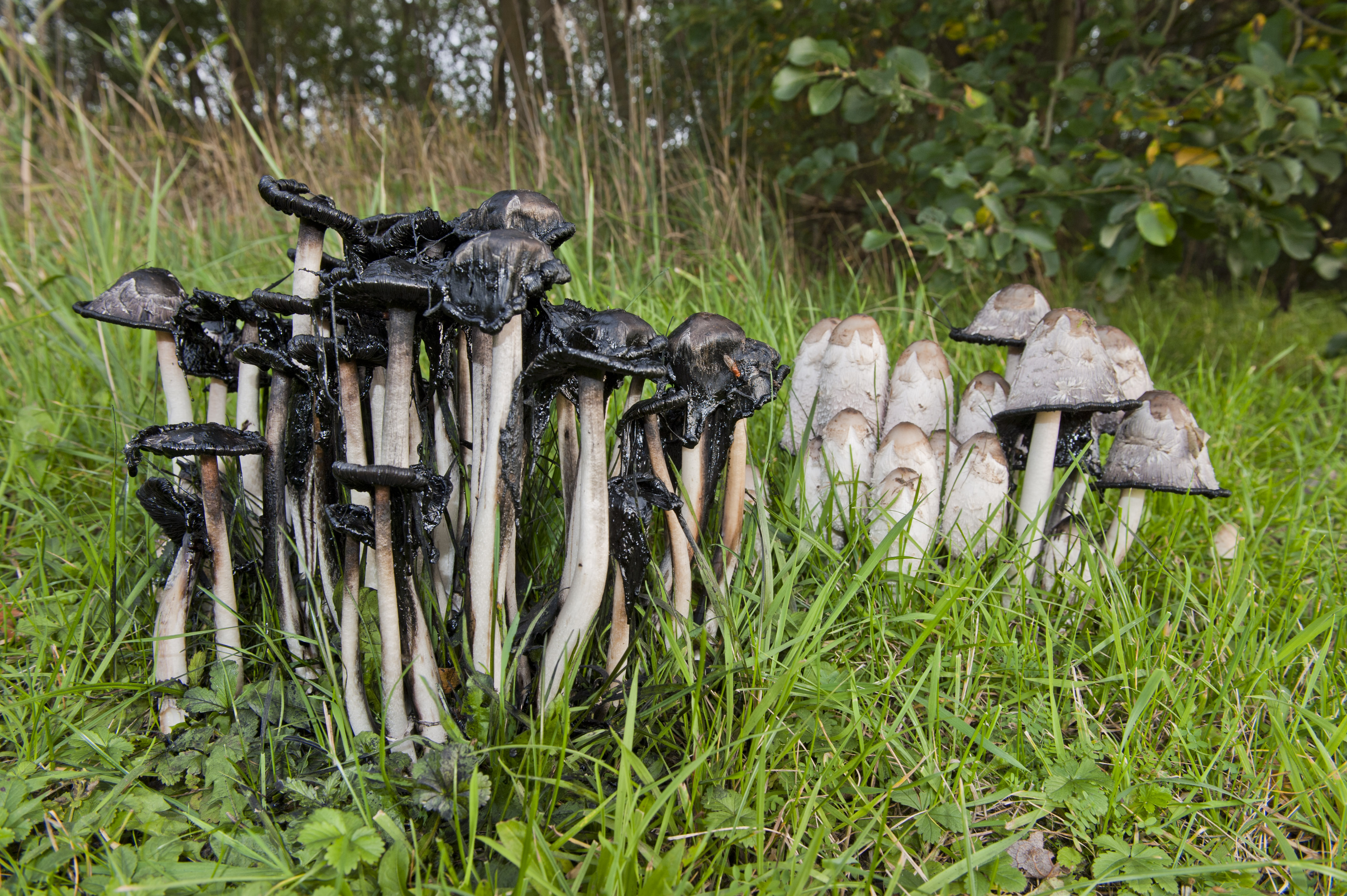 Coprinus comatus